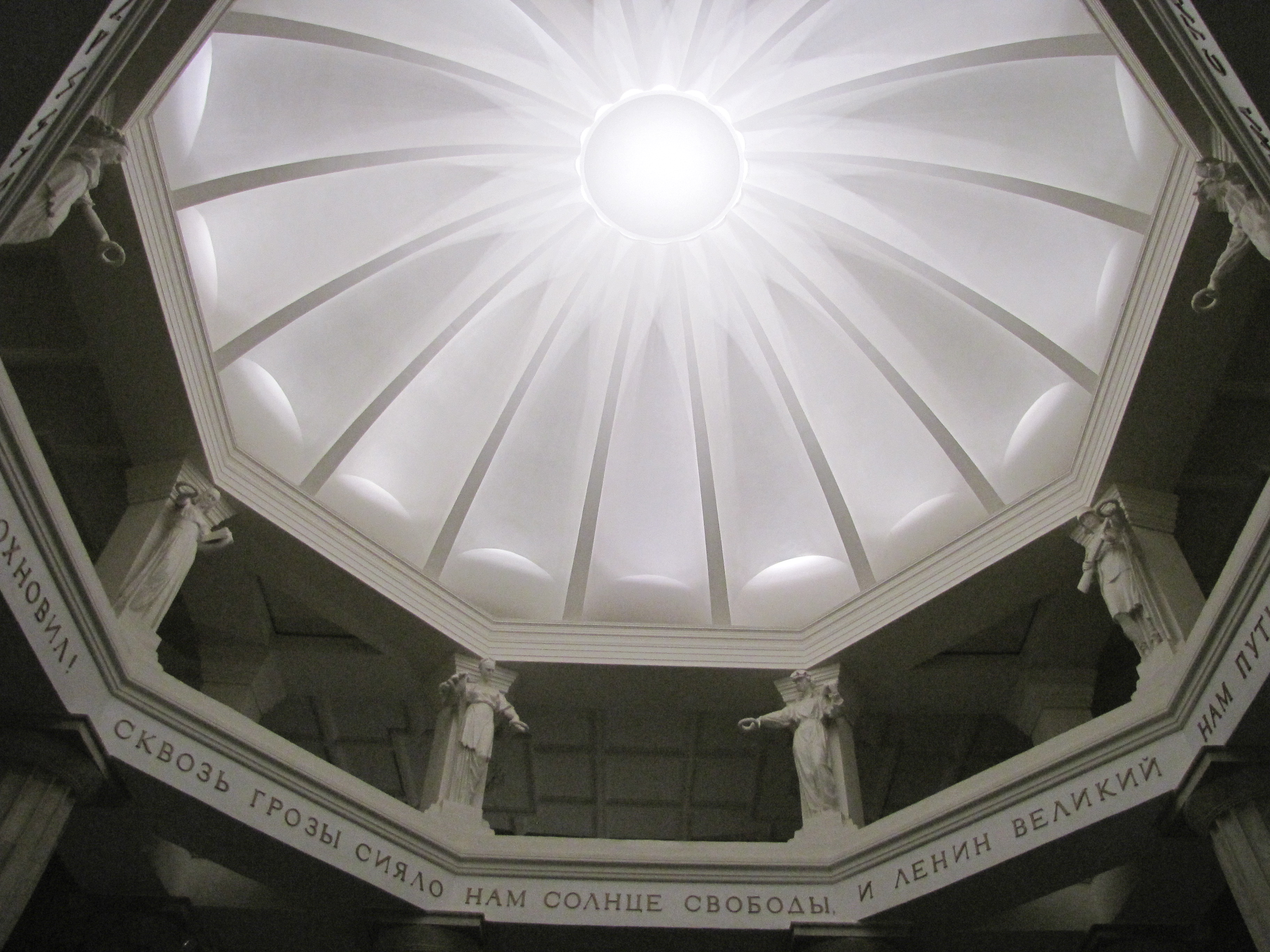 была заменена после реставрации строкой о Сталине, а затем возвращена на своё место